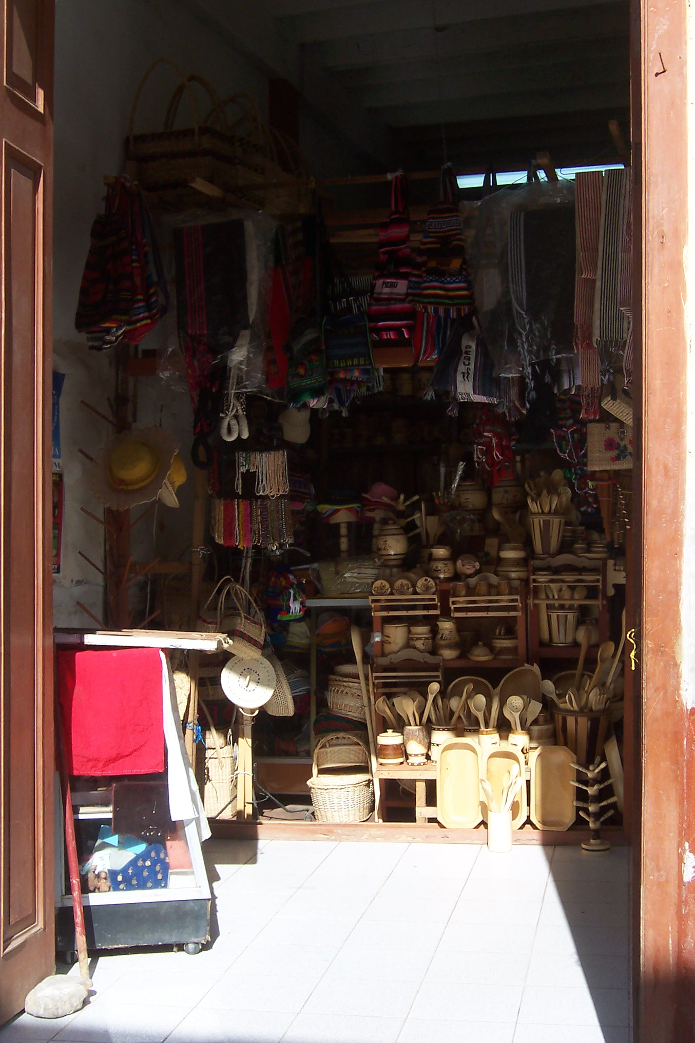 Catacaos tienda de artesanias Autor: Alfredobi Fecha: 2005